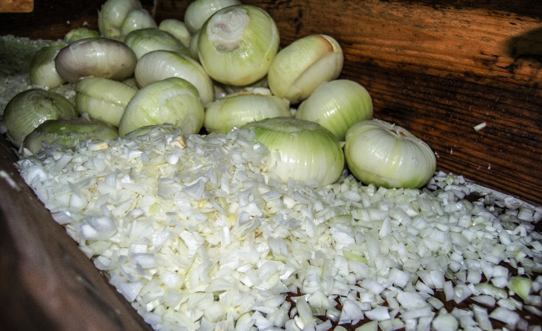 Picado en cebollas horcales para elaboración de morcilla de Burgos. Sandoval de la Reina.